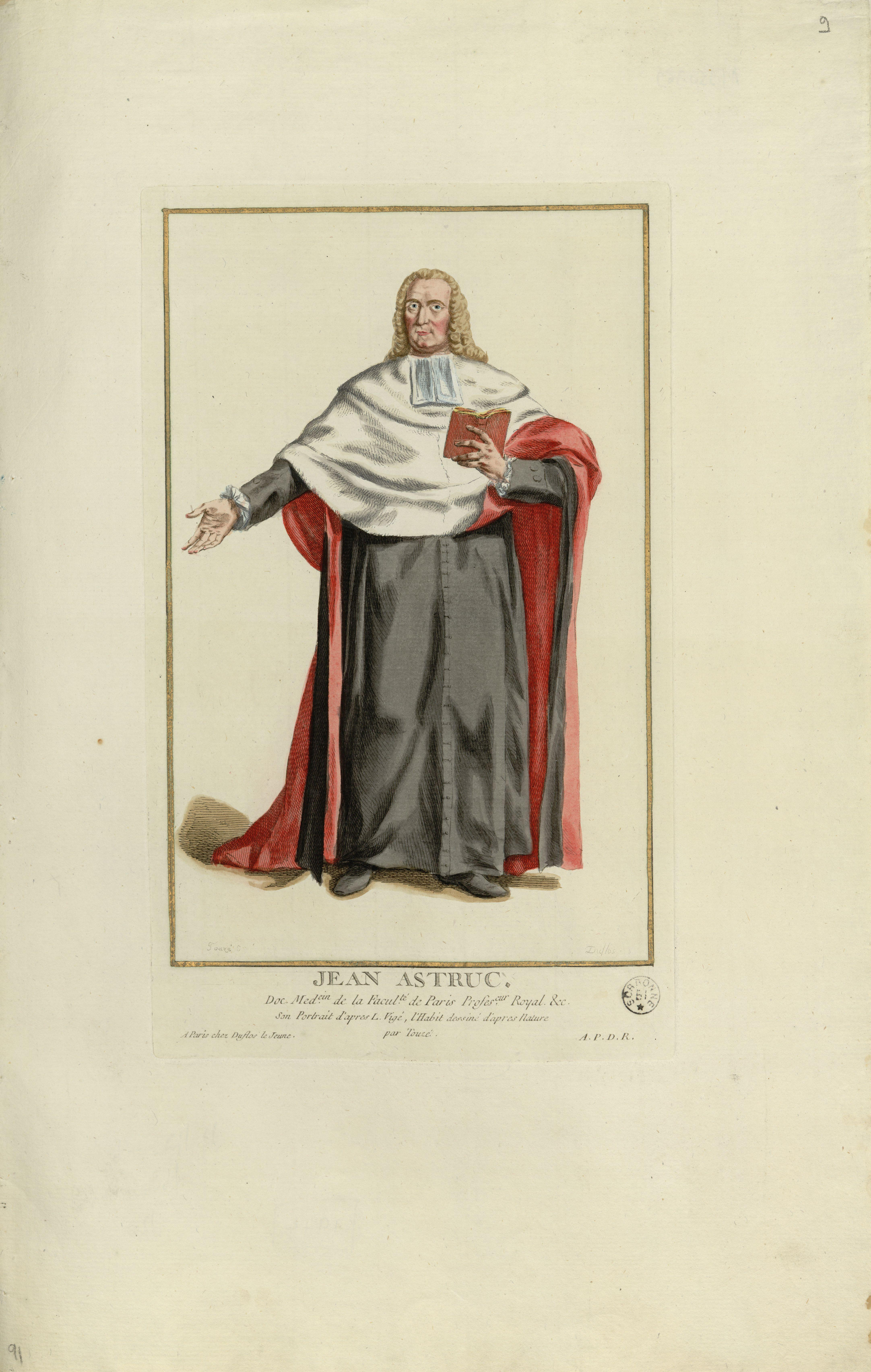 Estampe